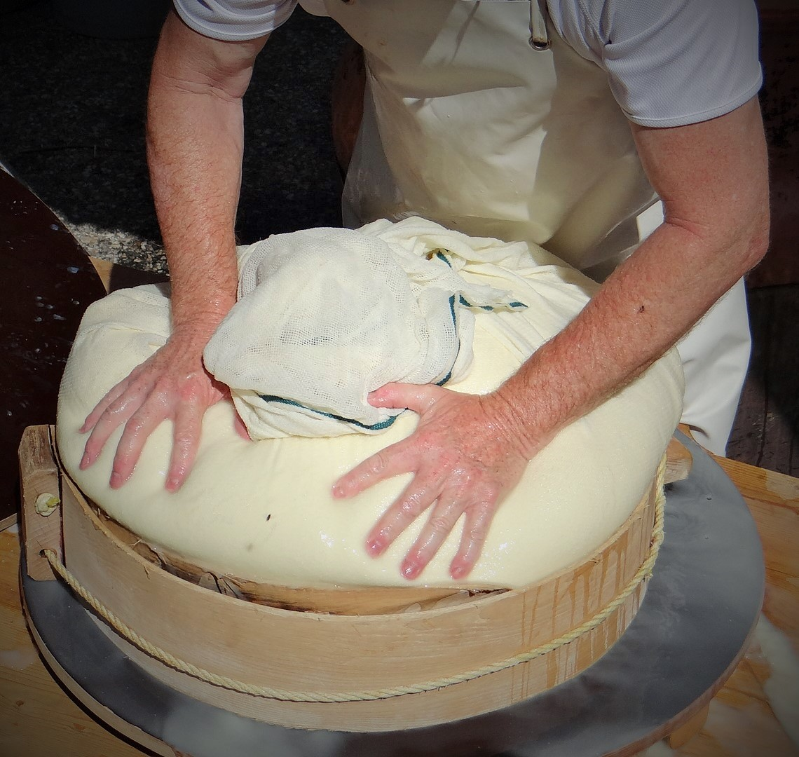 Fabrication traditionnelle du Beaufort par la Coopérative Laitière de Moutiers lors de la fête de l’Alpe et des Guides de Pralognan-la-Vanoise, 17 juillet 2016 ː toile de lin disposée dans le cercle traditionnel en bois de hêtre, préalablement installés sur un plateau de bois appelé le « foncet ».